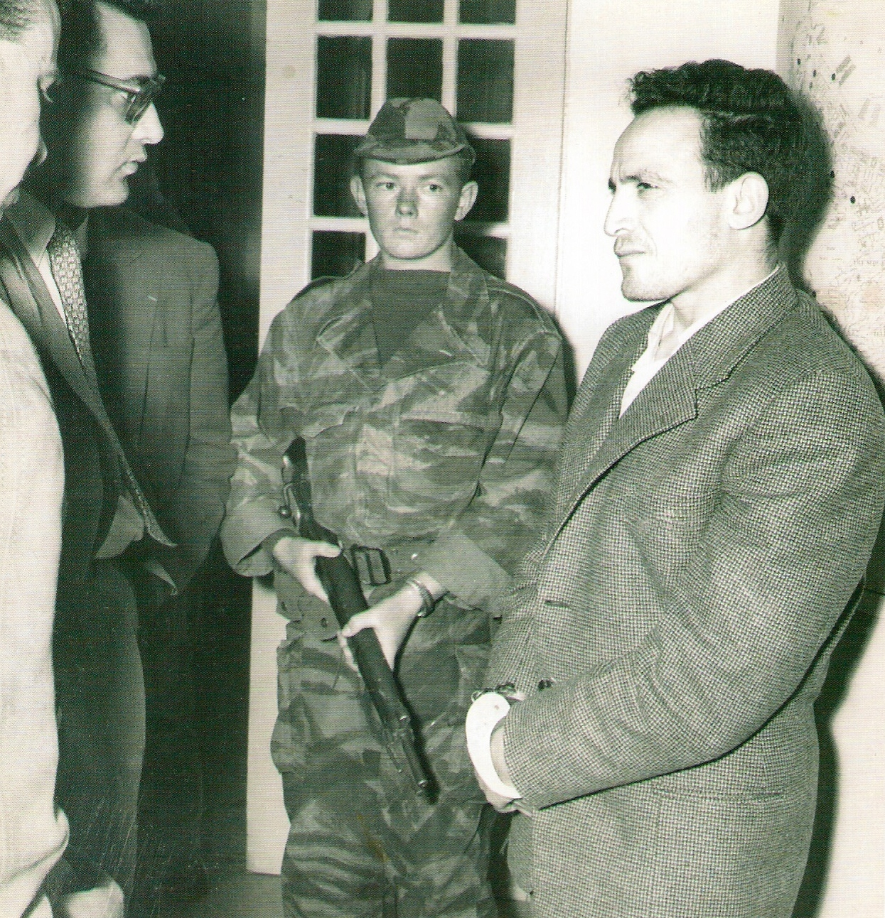 Arrestation de Larbi Ben M'Hidi Le 25 Février 1957 par le 3eme RPC (Régiment de parachutistes coloniaux) à la Rue Claude Debussy, Alger